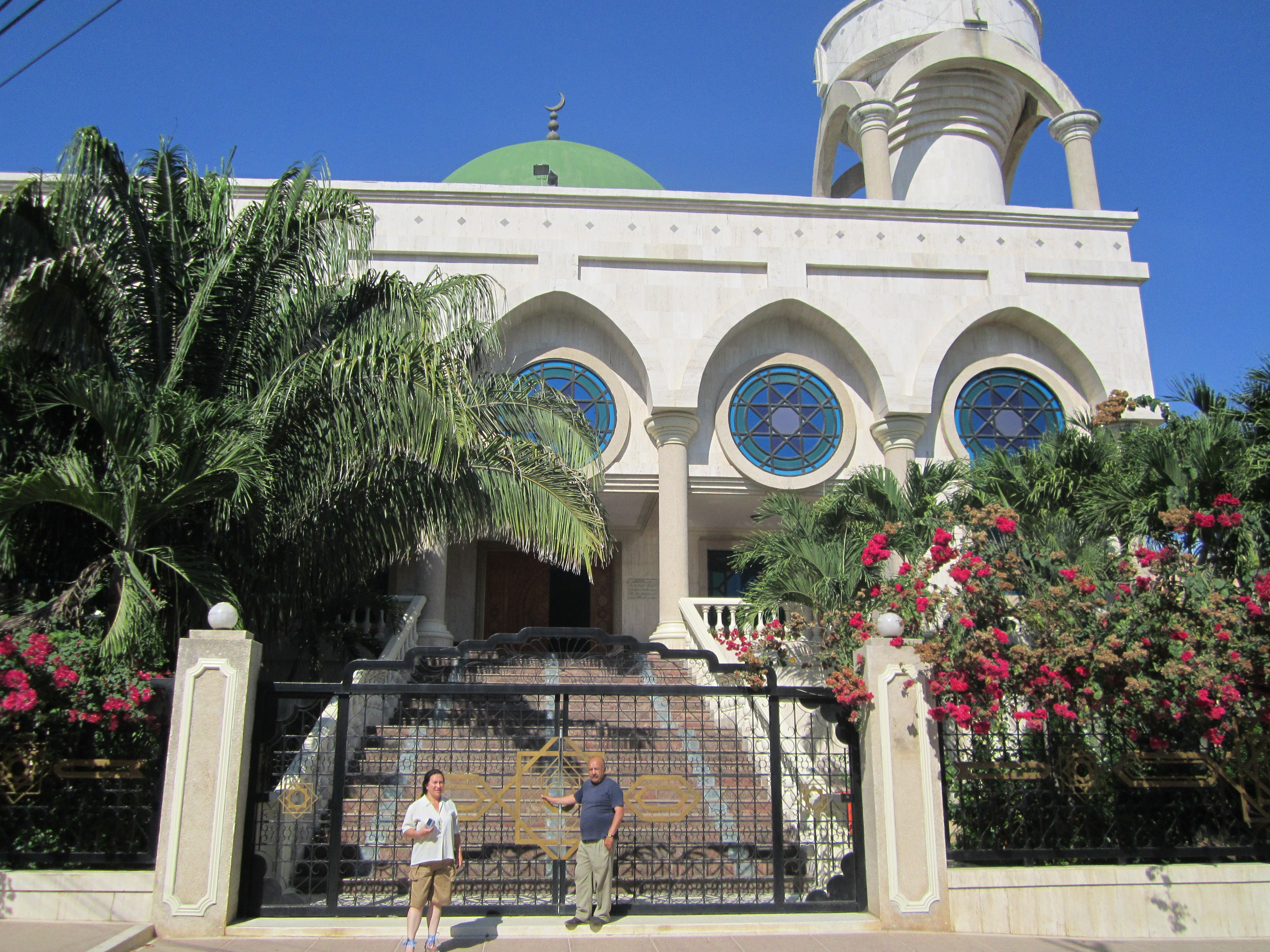 Vista parcial de la Mezquita "Omar ibn Al-Khattab" en Maicao.